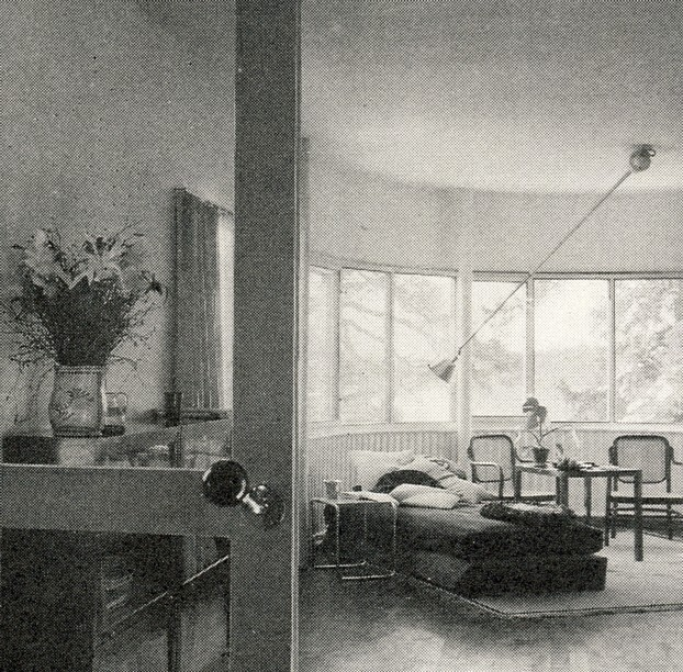 "Villa Markelius" i Stockholm (Nockeby). Arkitekt Sven Markelius egen villa från 1930. Vardagsrummet.